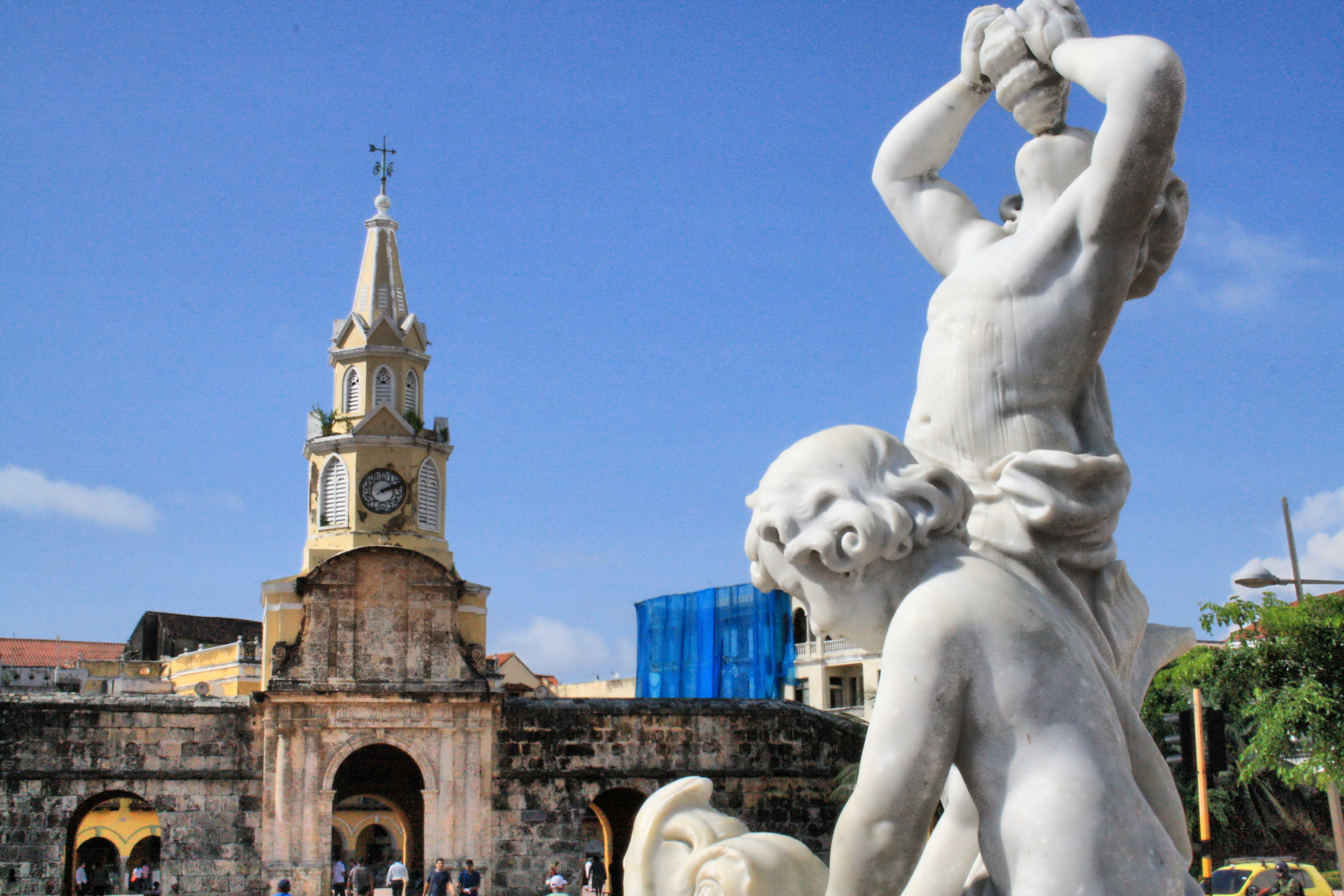 Puerta Principal. Hoy del Reloj